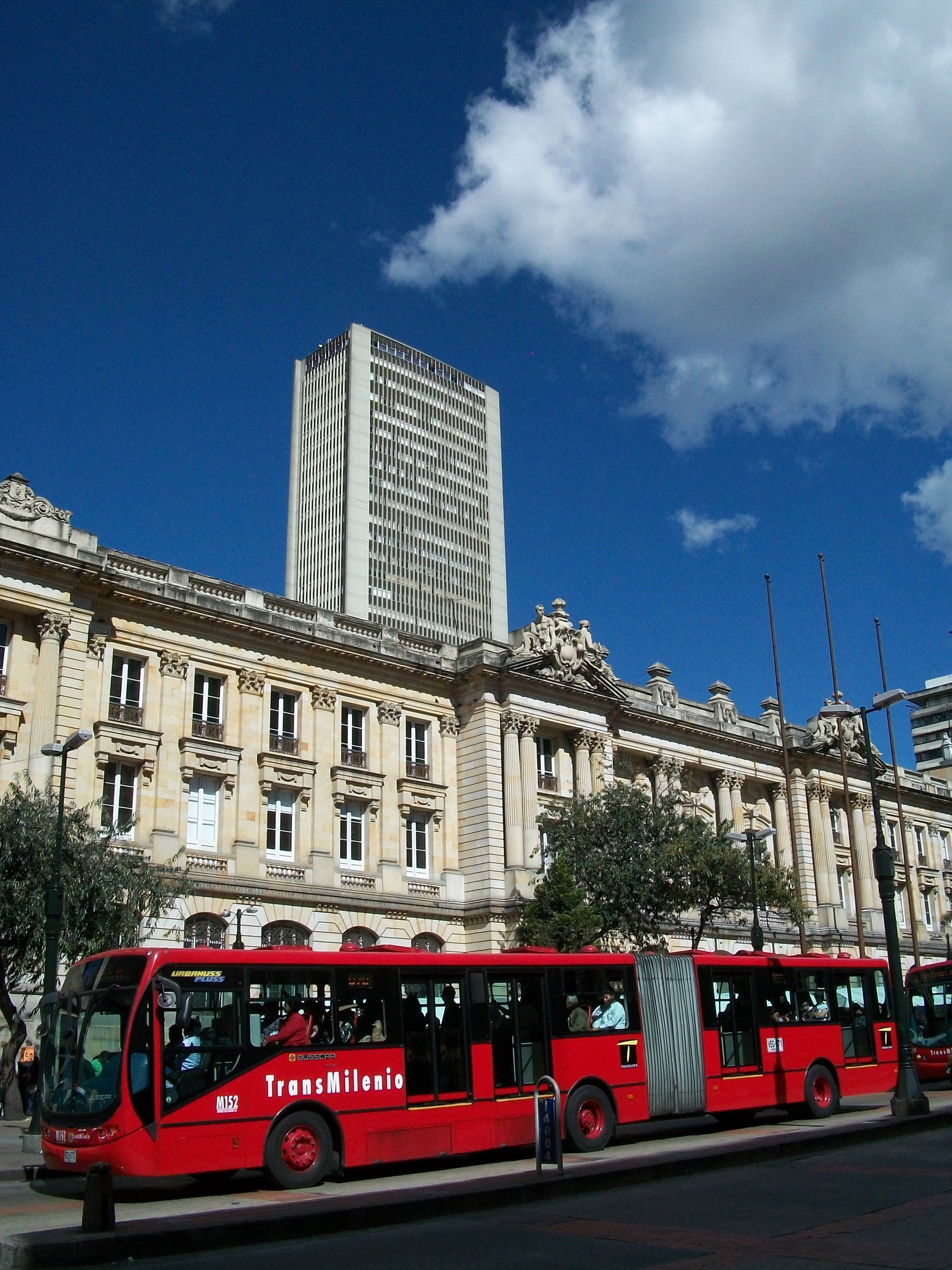 Edificio de Avianca desde el Eje Ambiental. En primer plano articulado de Transmilenio.